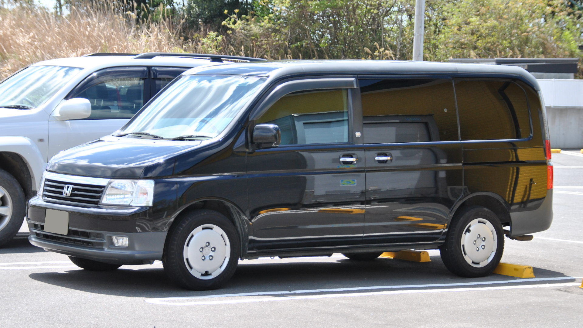 ホンダ・ステップワゴン（2代目 前期型）